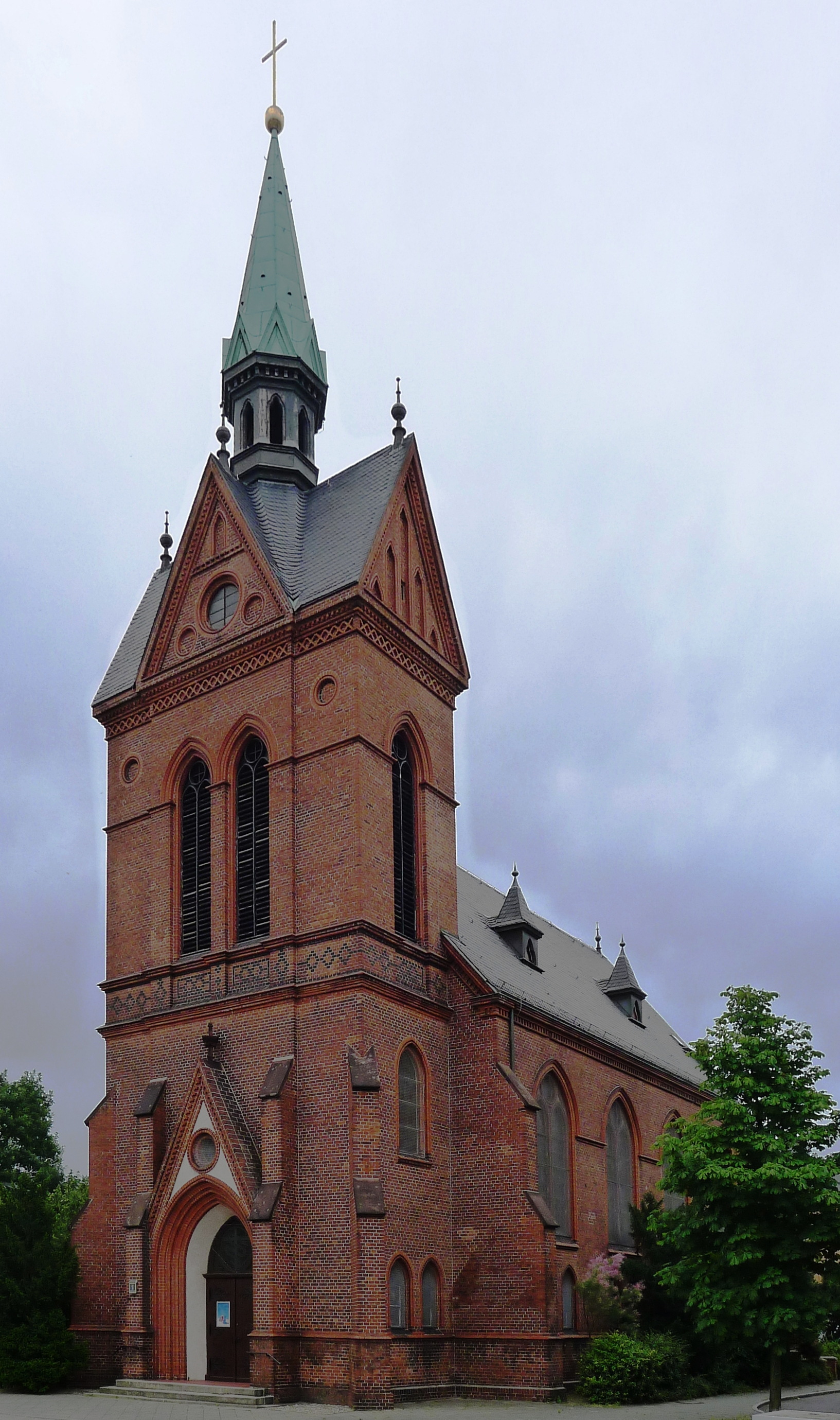 Blick auf den Turm der Kirche